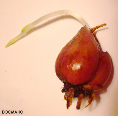 Lilium primulinum var. ochraceum (Lilium majoense), bulb